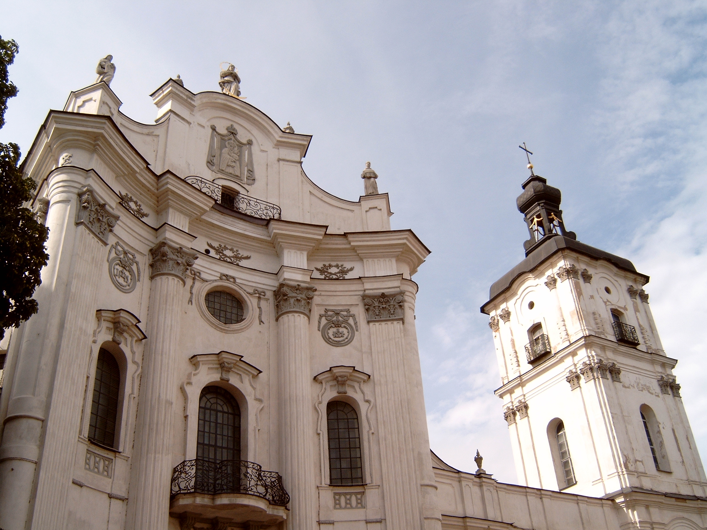 Монастир Кармелітів Босих.: Монастир Кармелітів Босих в Бердичеві. Фронтальний бік собору.